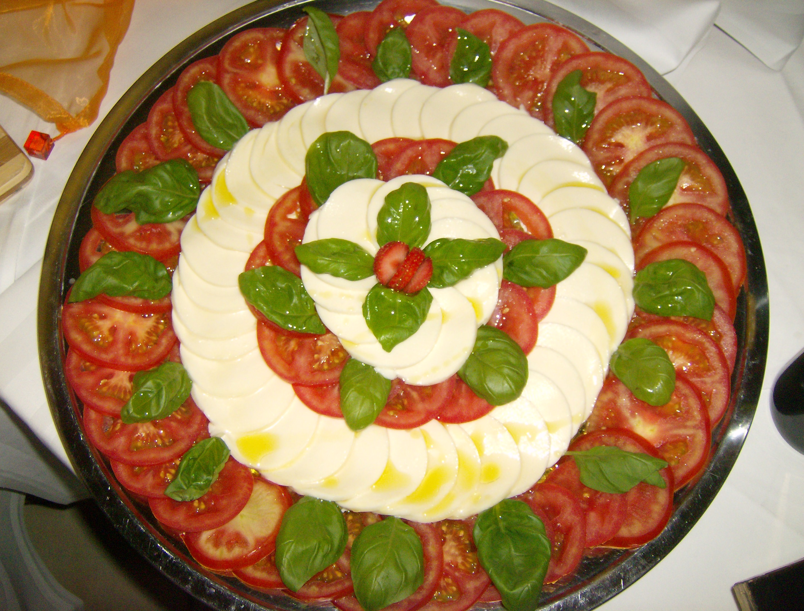 Mozzarella mit Basilikum und Tomaten.